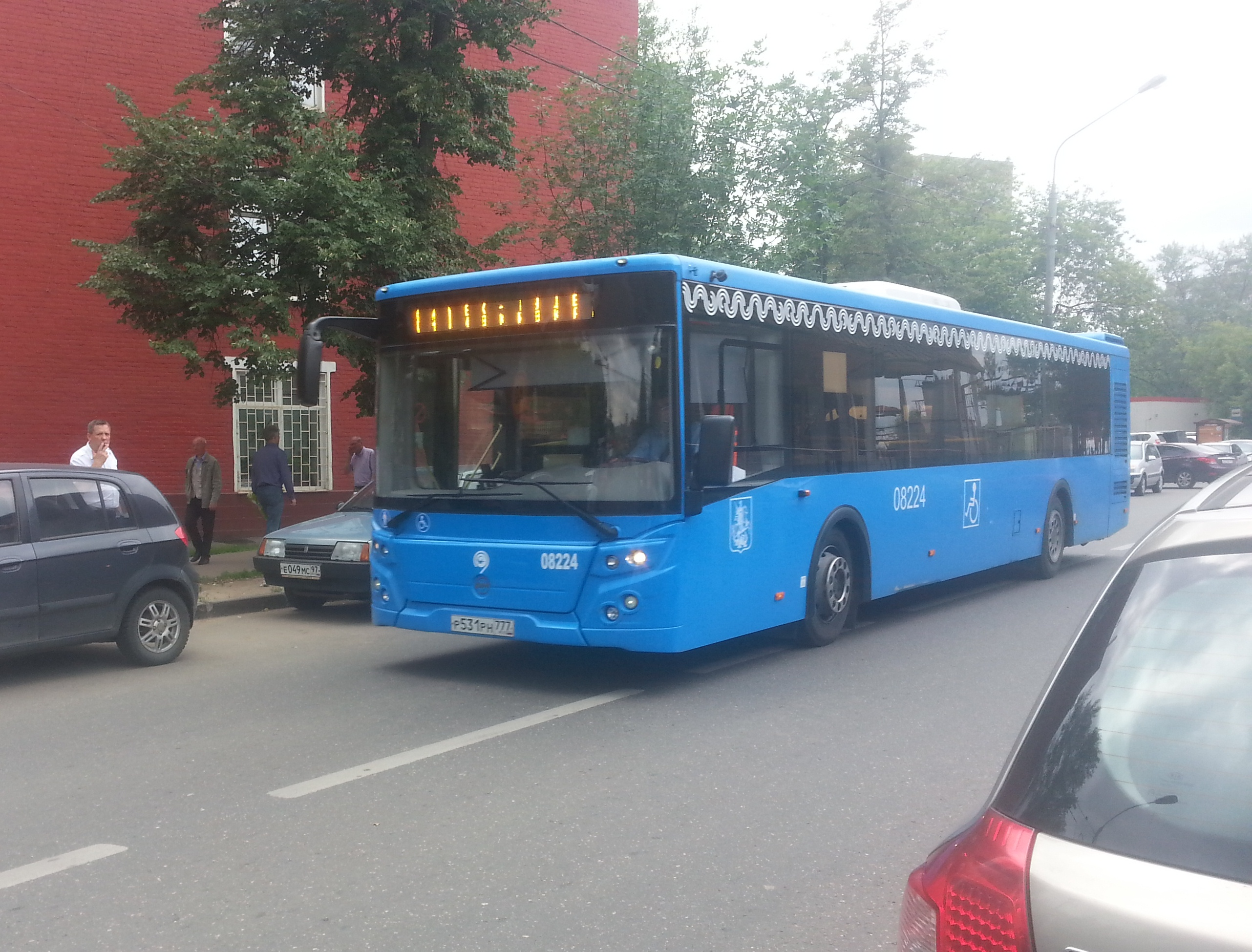 ЛиАЗ-5292.22 08224 на Барвихинской улице в Можайском районе